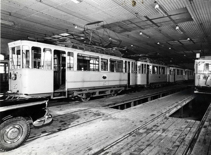 Oslo Sporveier. Trikk motorvogn 7 (fra 1899, ombygget 1918) type AEG (kalt Union-vogn) og ditto vogn 25 med flere i Homansby vognhall.